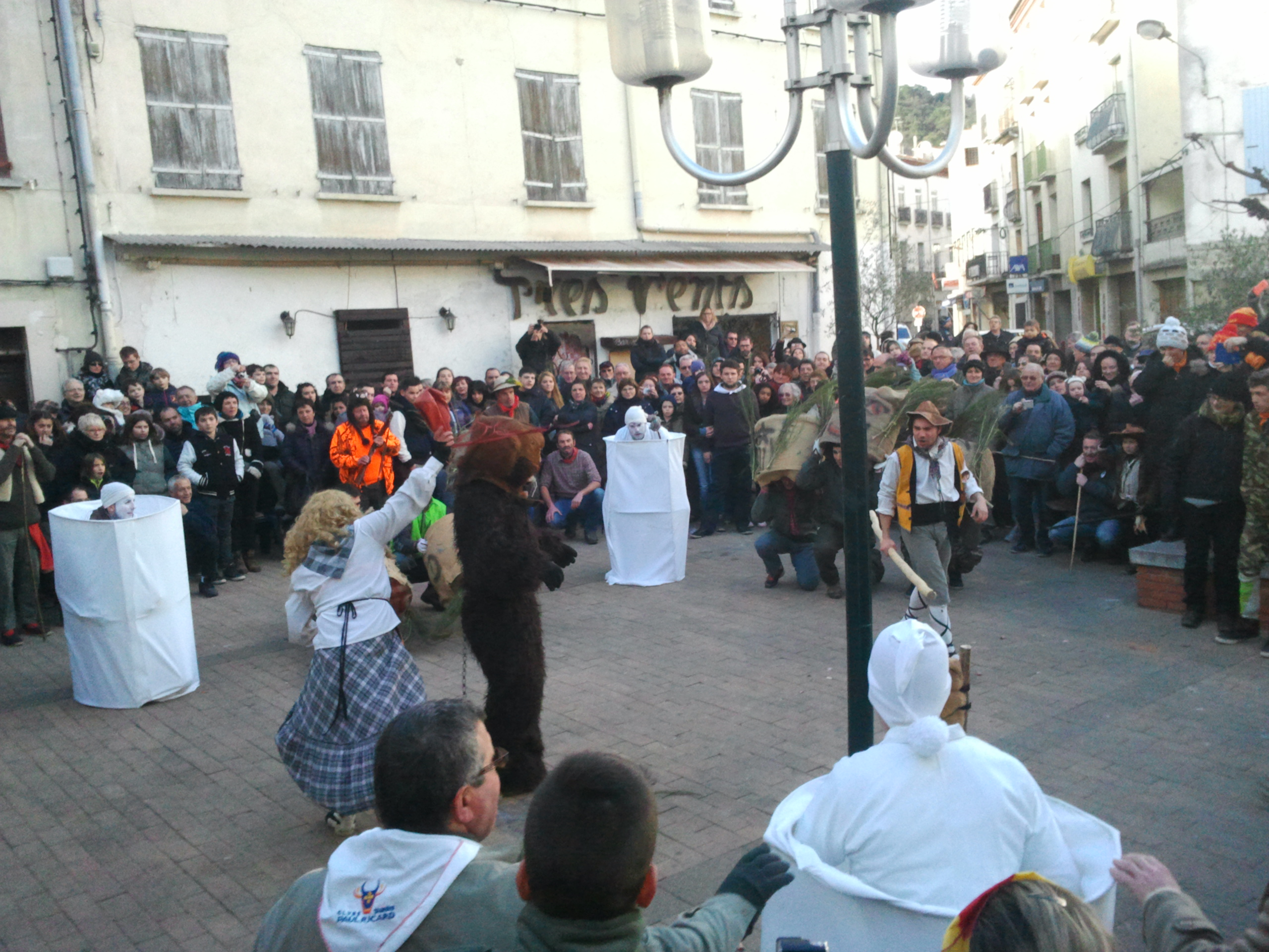 Fête de l'ours à Arles-sur-Tech